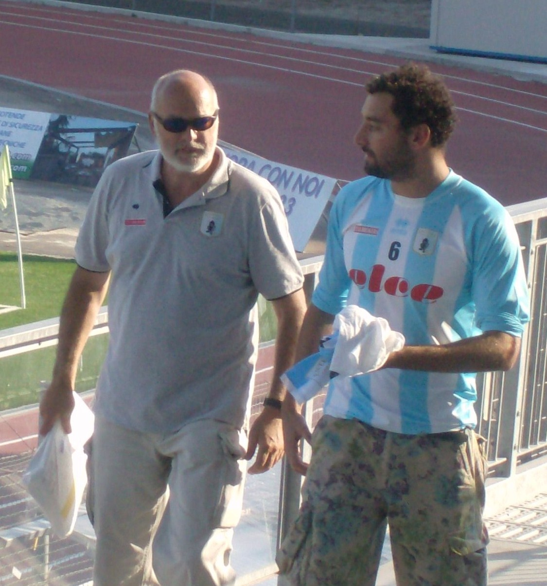 Maurizio Felugo (a destra) con il presidente dell'Entella Gozzi (a sinistra) allo Stadio Counale di Chiavari nell'agosto del 2012